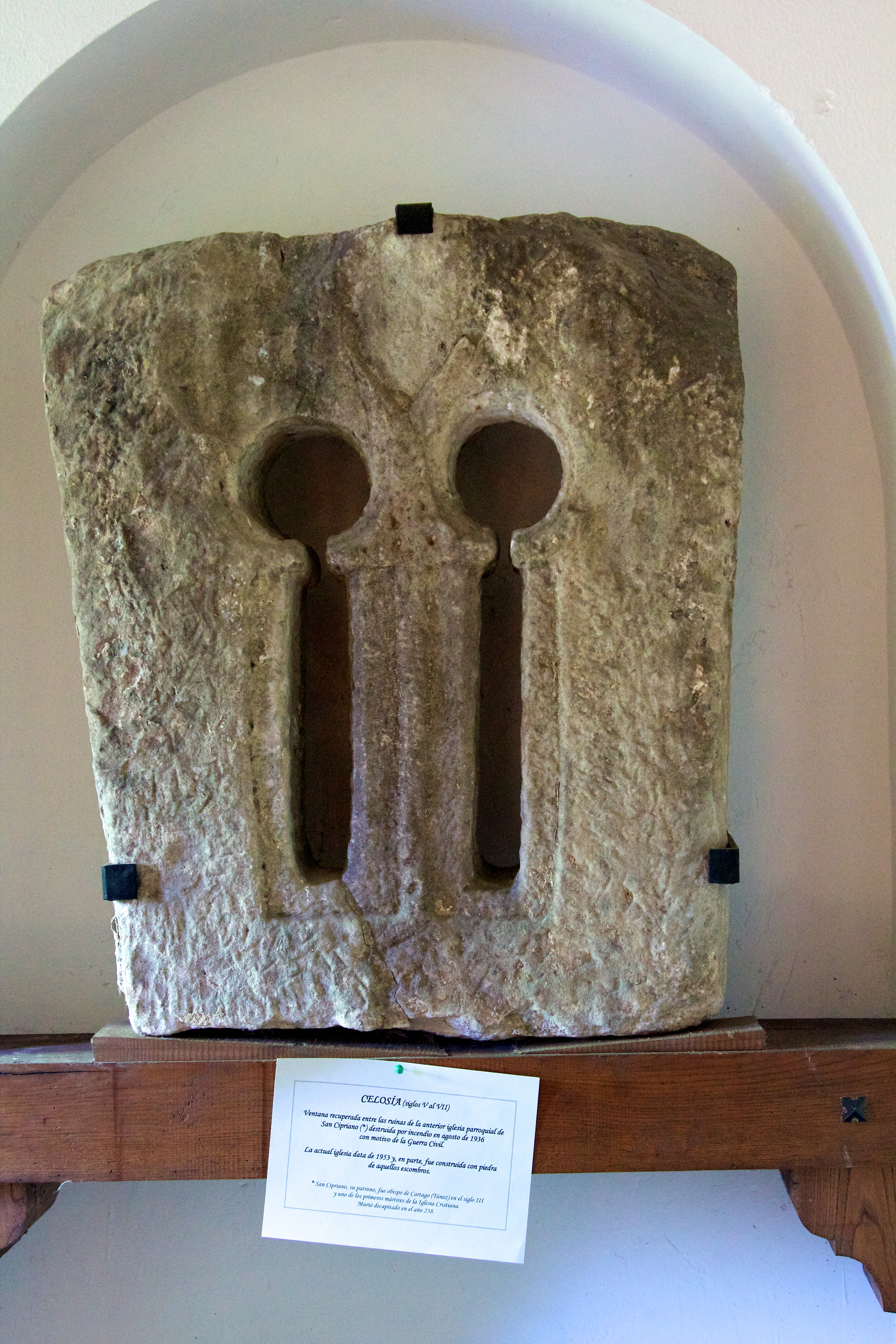 Celosía prerrománica de la iglesia de San Cipriano de Pillarno, en el concejo asturiano de Castrillón, España.